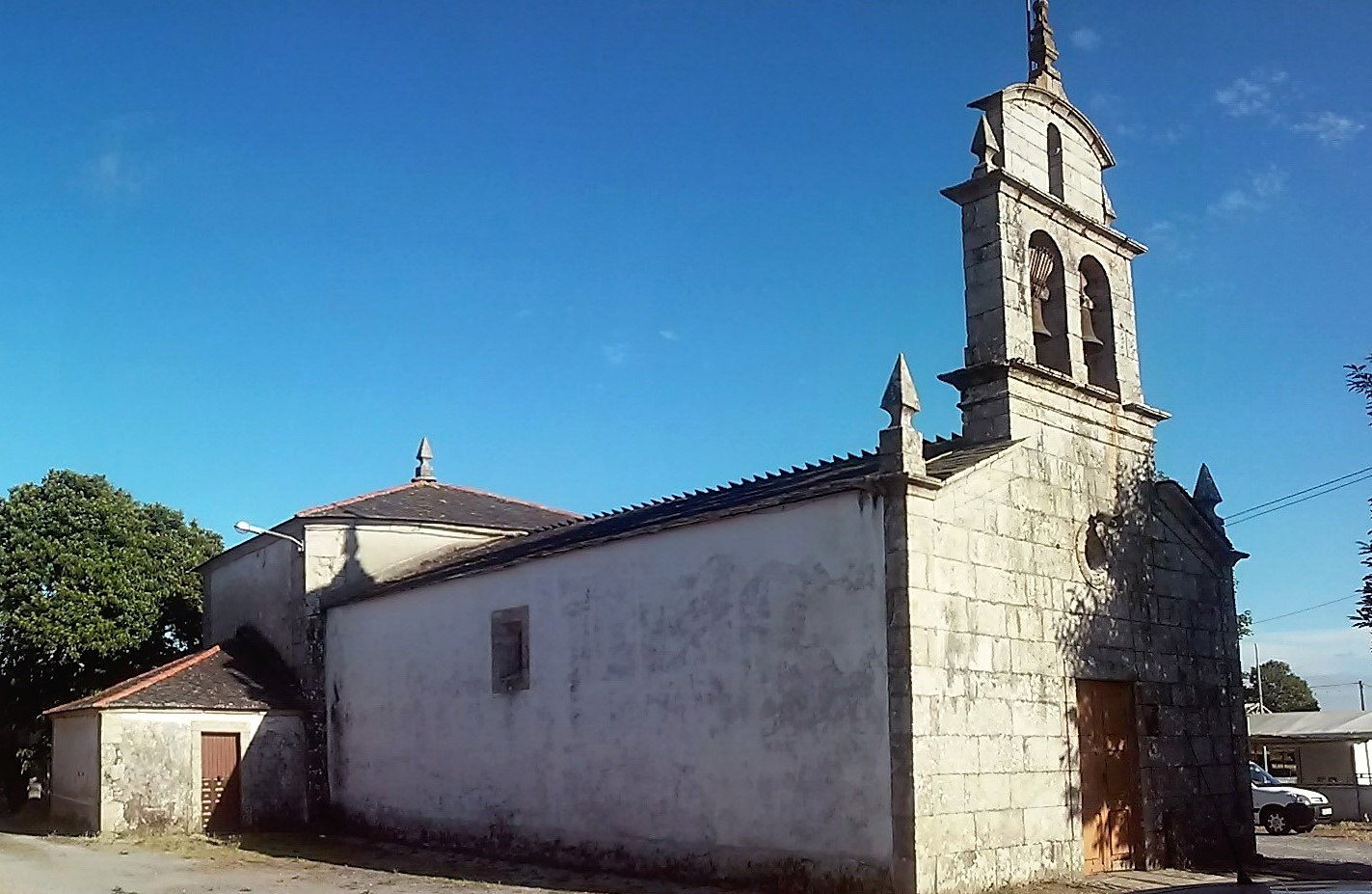 Igrexa de Árbol, Vilalba.